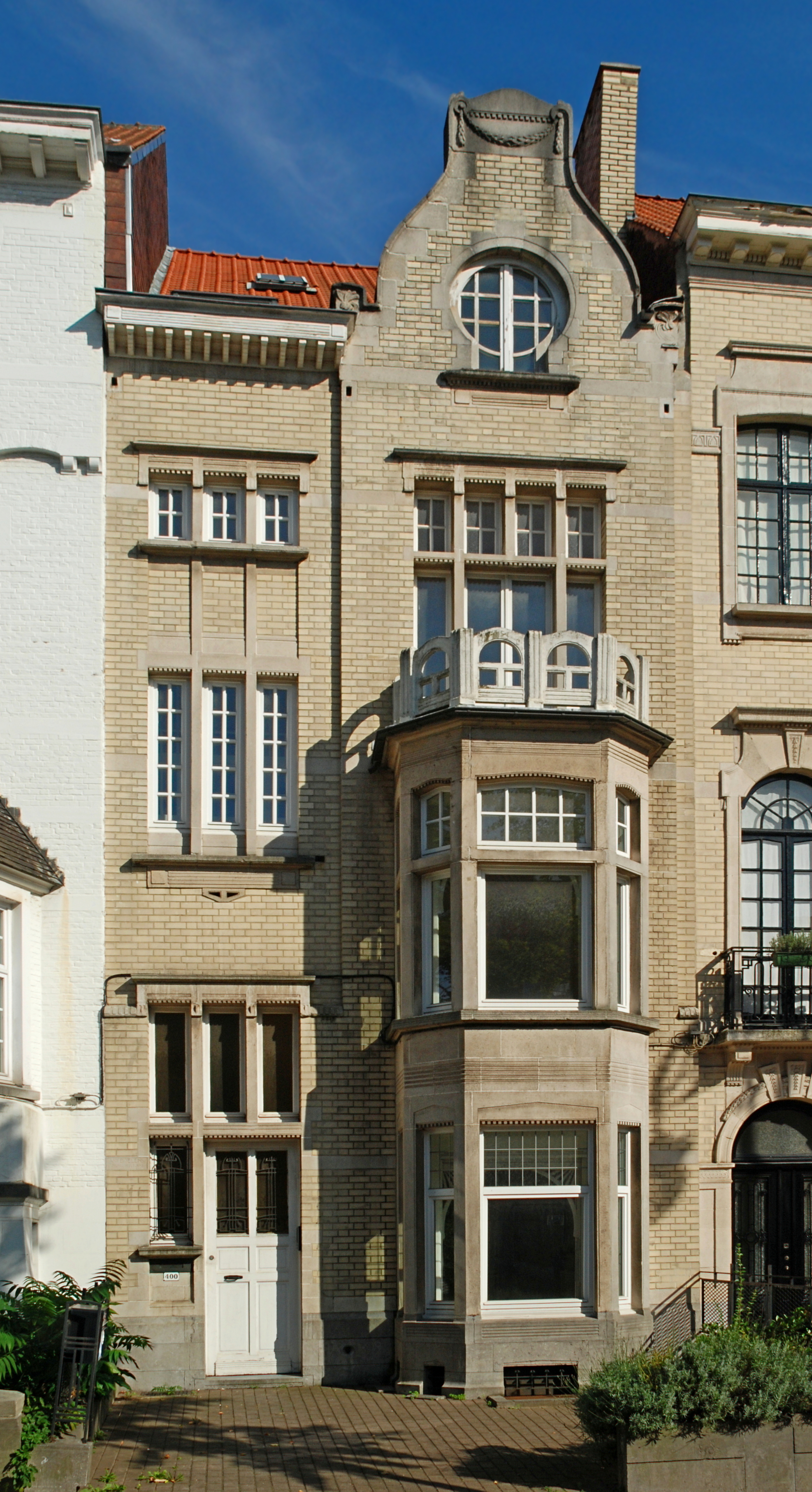 Belgique - Bruxelles - Avenue Brugmann 400 (Art nouveau, architecte Victor Boelens, 1908)